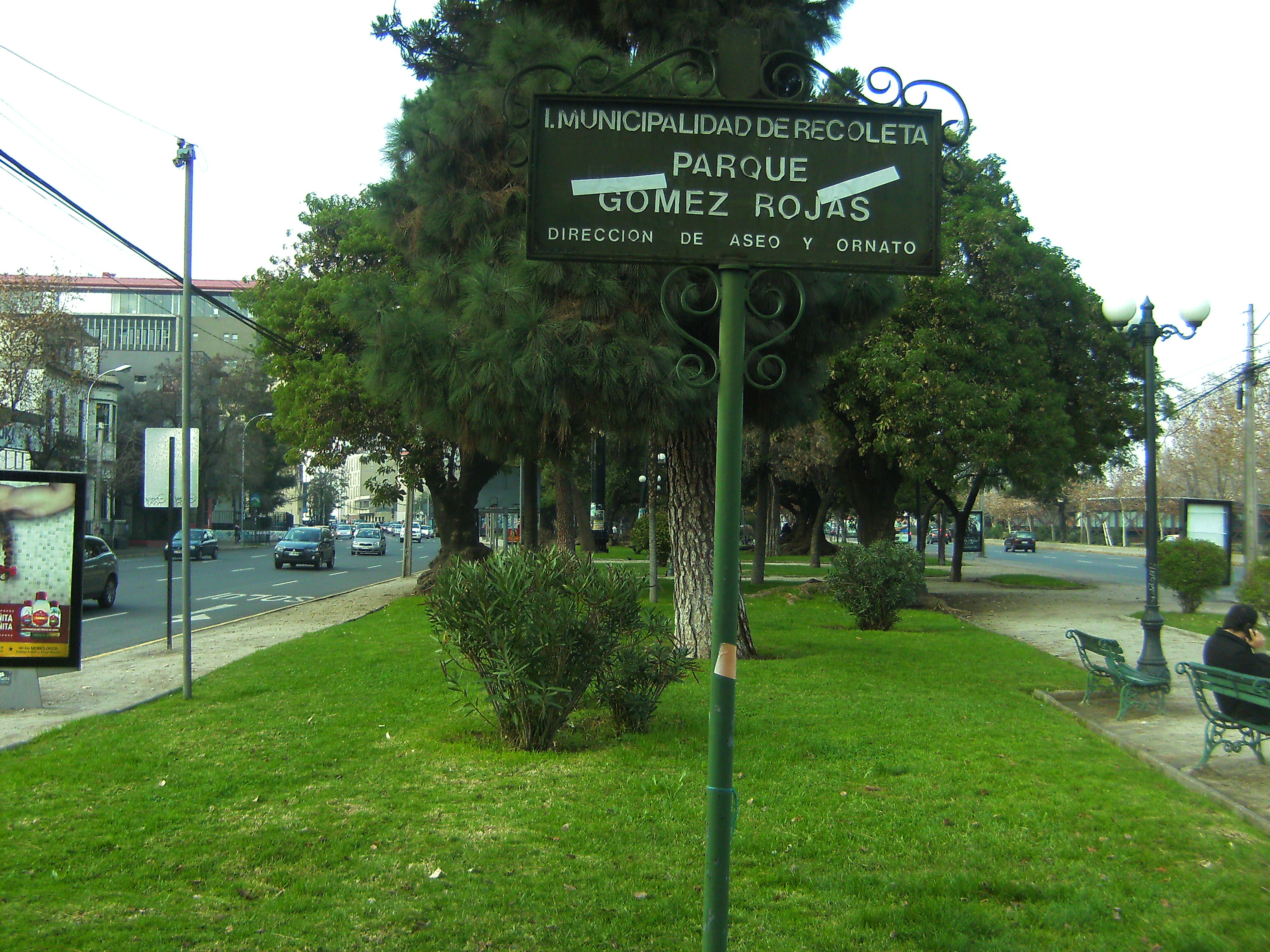 Plaza Gómez Rojas en Santiago de Chile